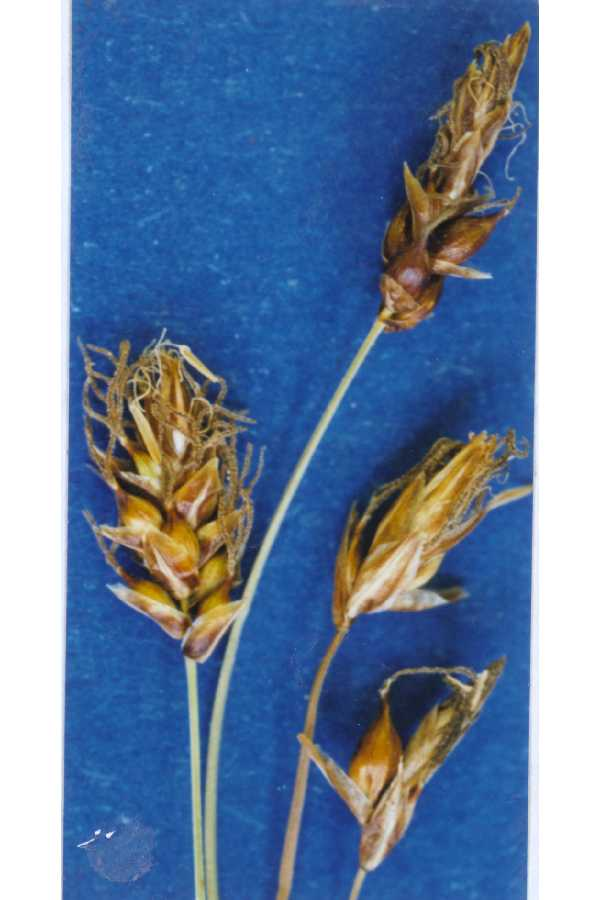 Carex obtusata Lilj.